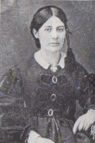 ジェームス・ハミルトン・バラの妻であるマーガレット